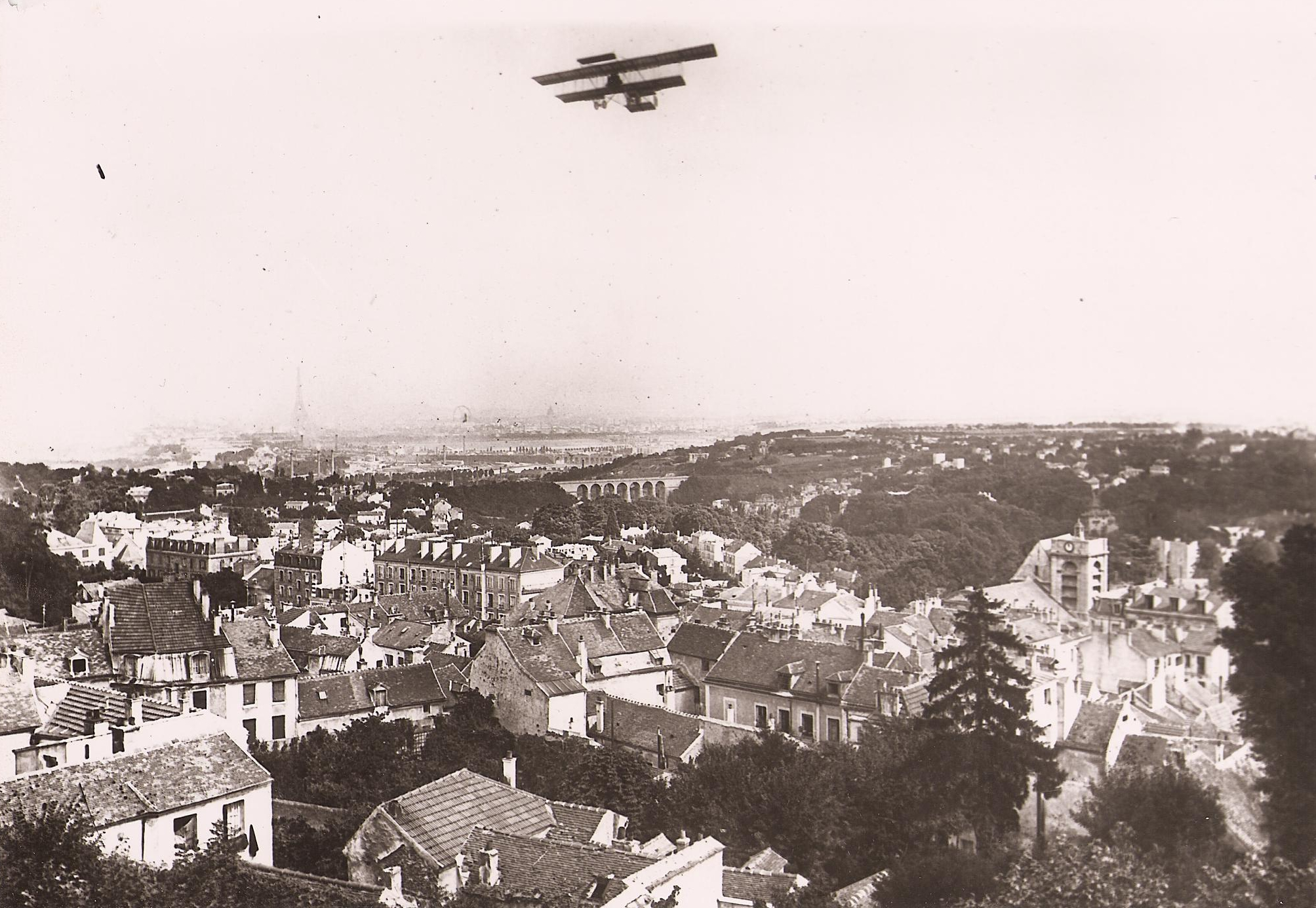 Weymann , tentative grand prix michelin 1910, peu après le départ d'Issy-les-Moulineaux, la Tour Eiffel au fond.